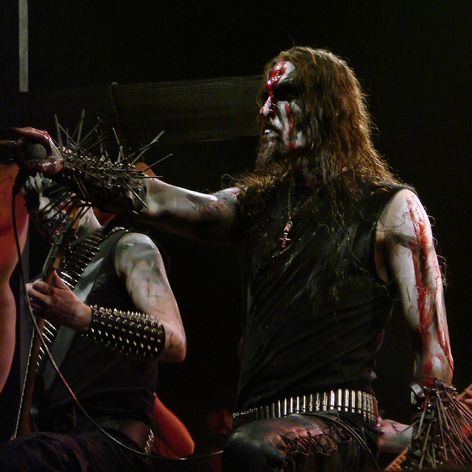 God Seed au Hellfest 2009: Gaahl.